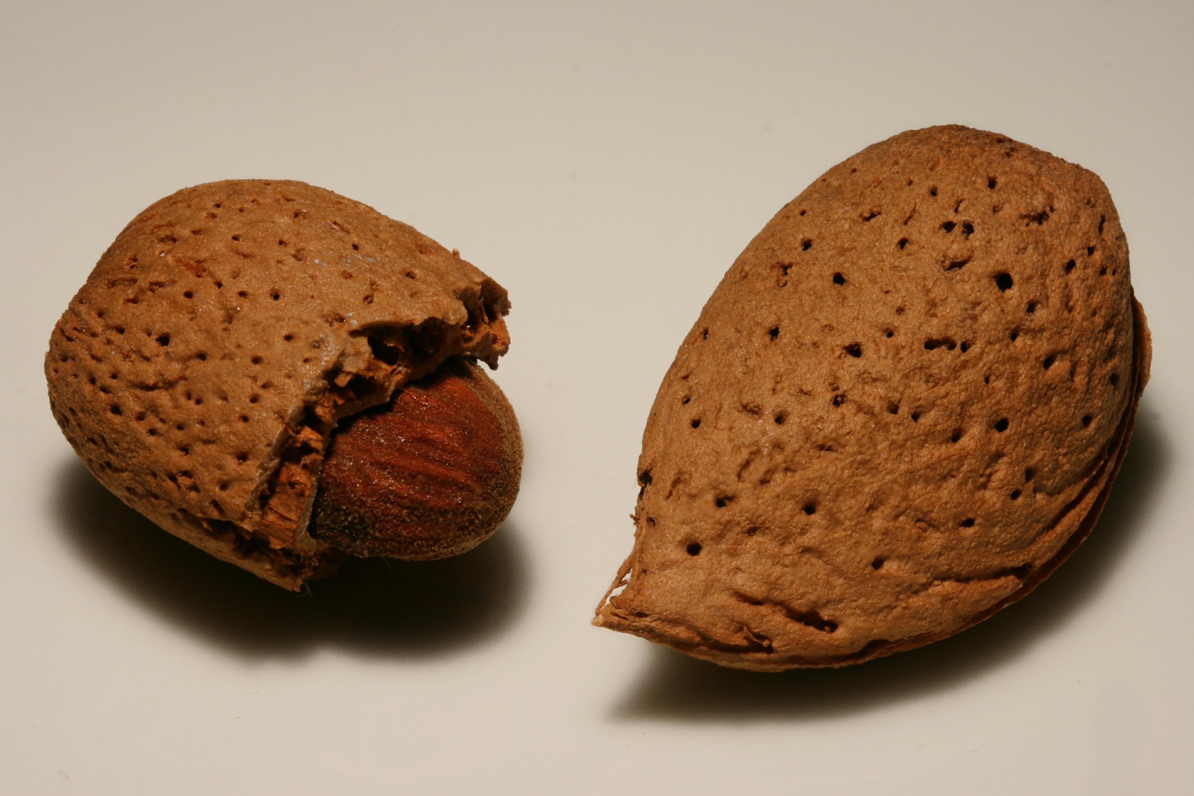 Mandel